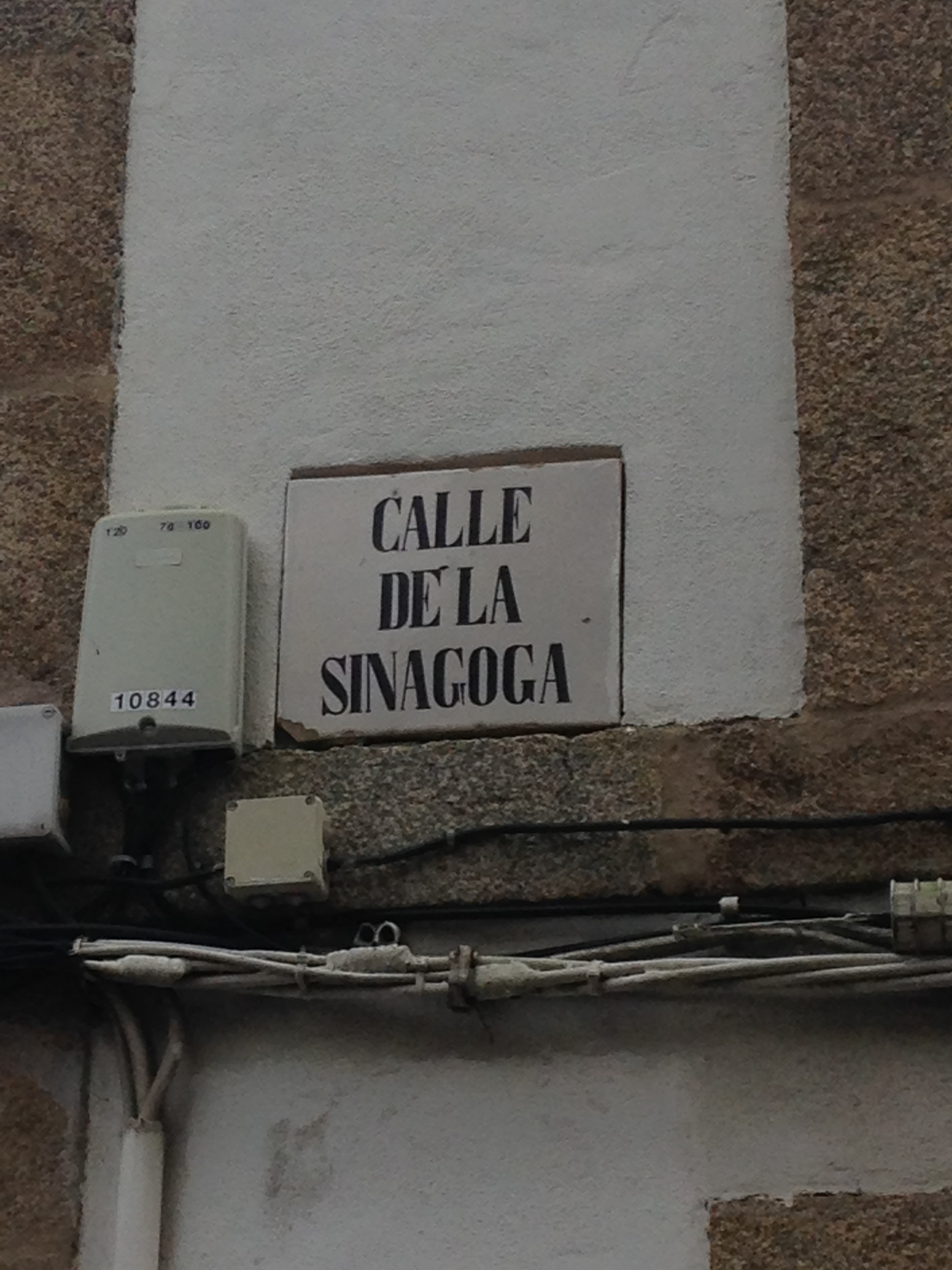 Placa da rúa da Sinagoga na cidade vella da Coruña.